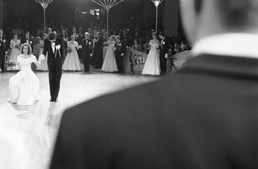 Debütanten auf dem Chrysanthemenball im Deutschen Theater München